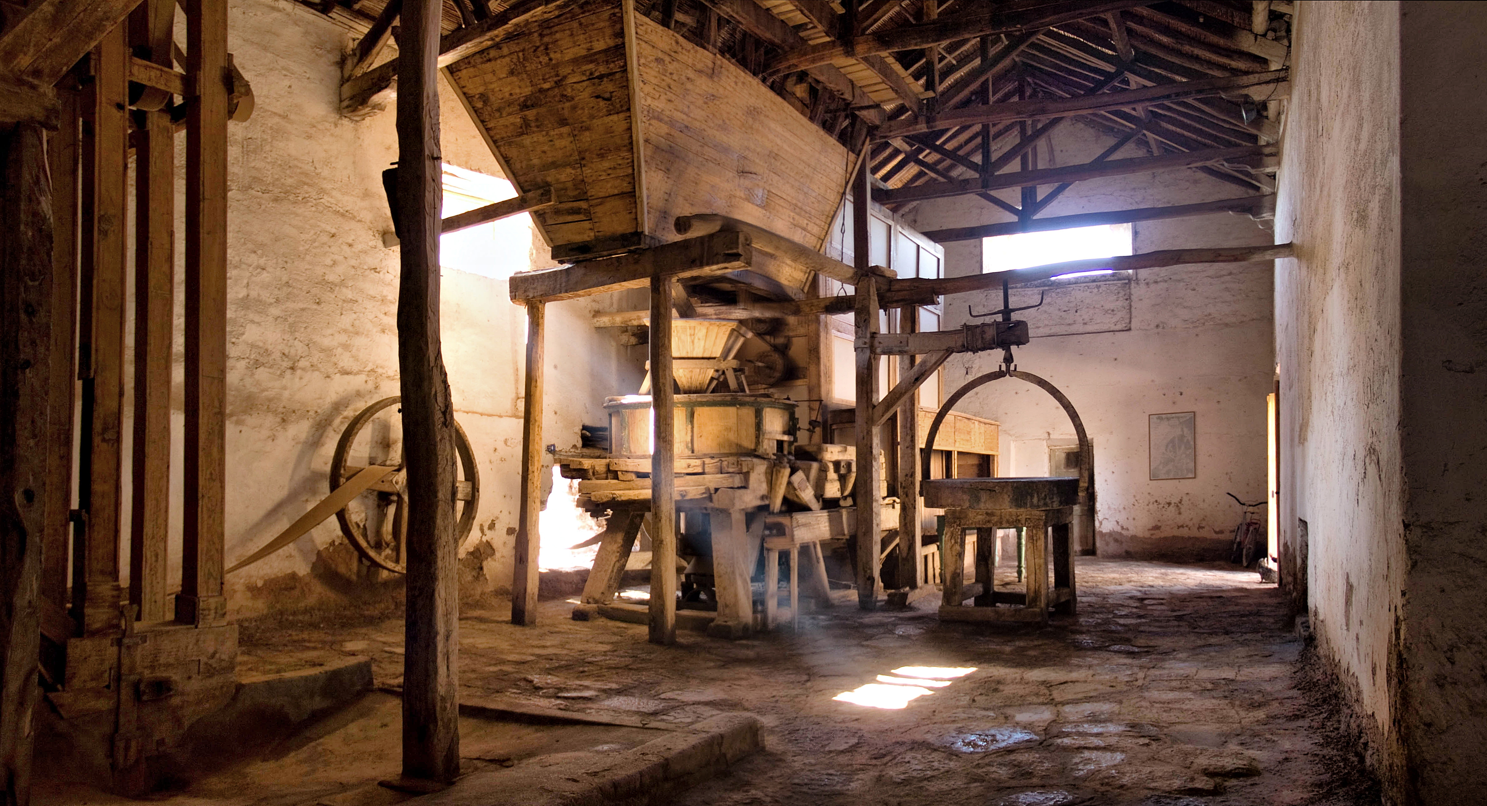 Molinos de San José de Jáchal